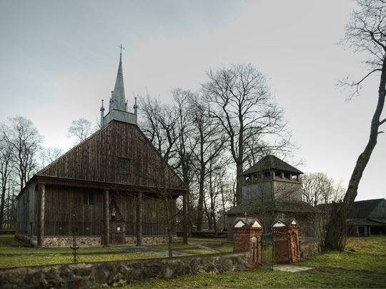 Šiaudinės švč, Mergelės Marijos bažnyčia